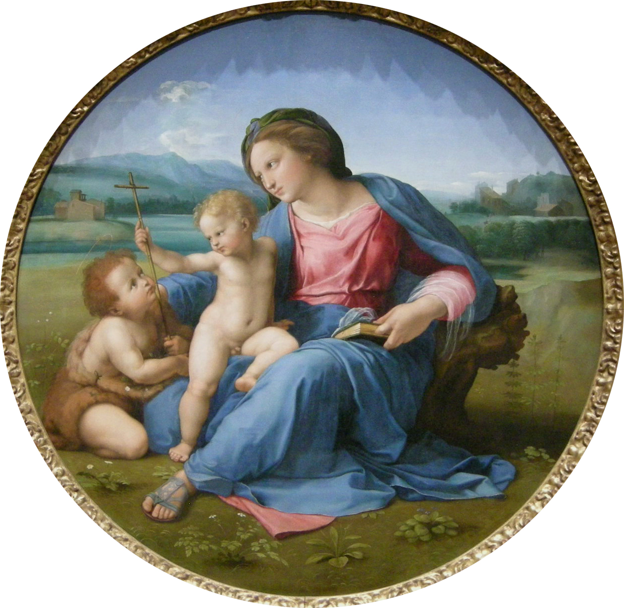 Madona de Alba